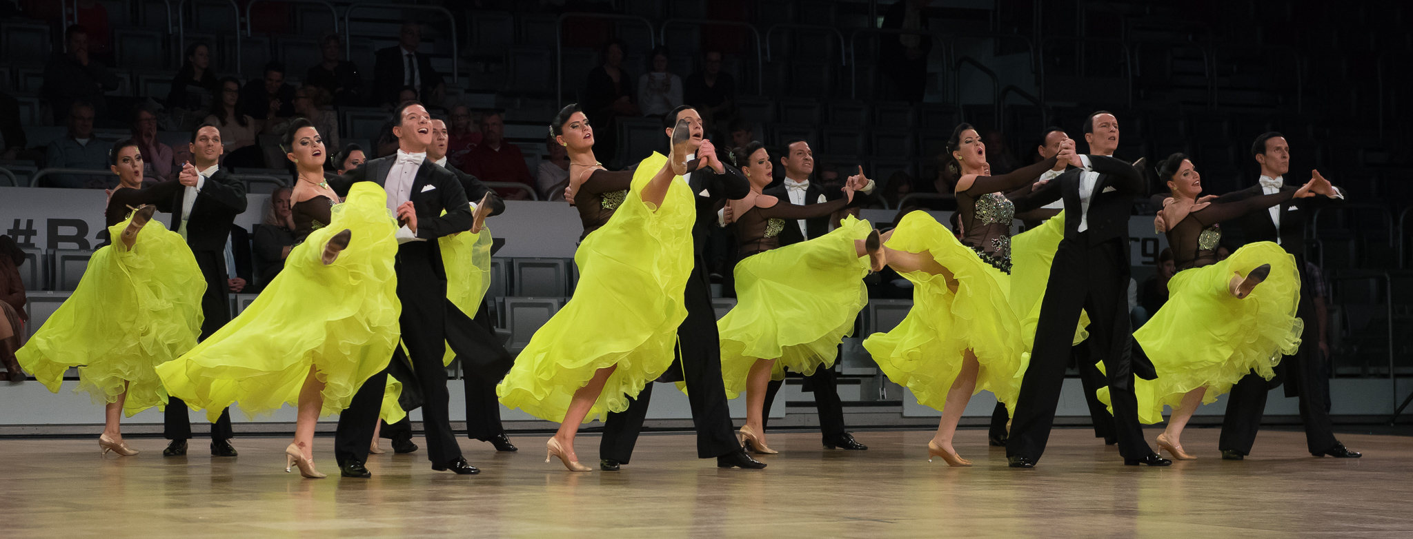 Amour fatal,Brose Arena Bamberg,Deutsche Meisterschaften der Formationen Standard & Latein 2016,Rot-Weiß-Club Gießen,Standard,Tanzsport